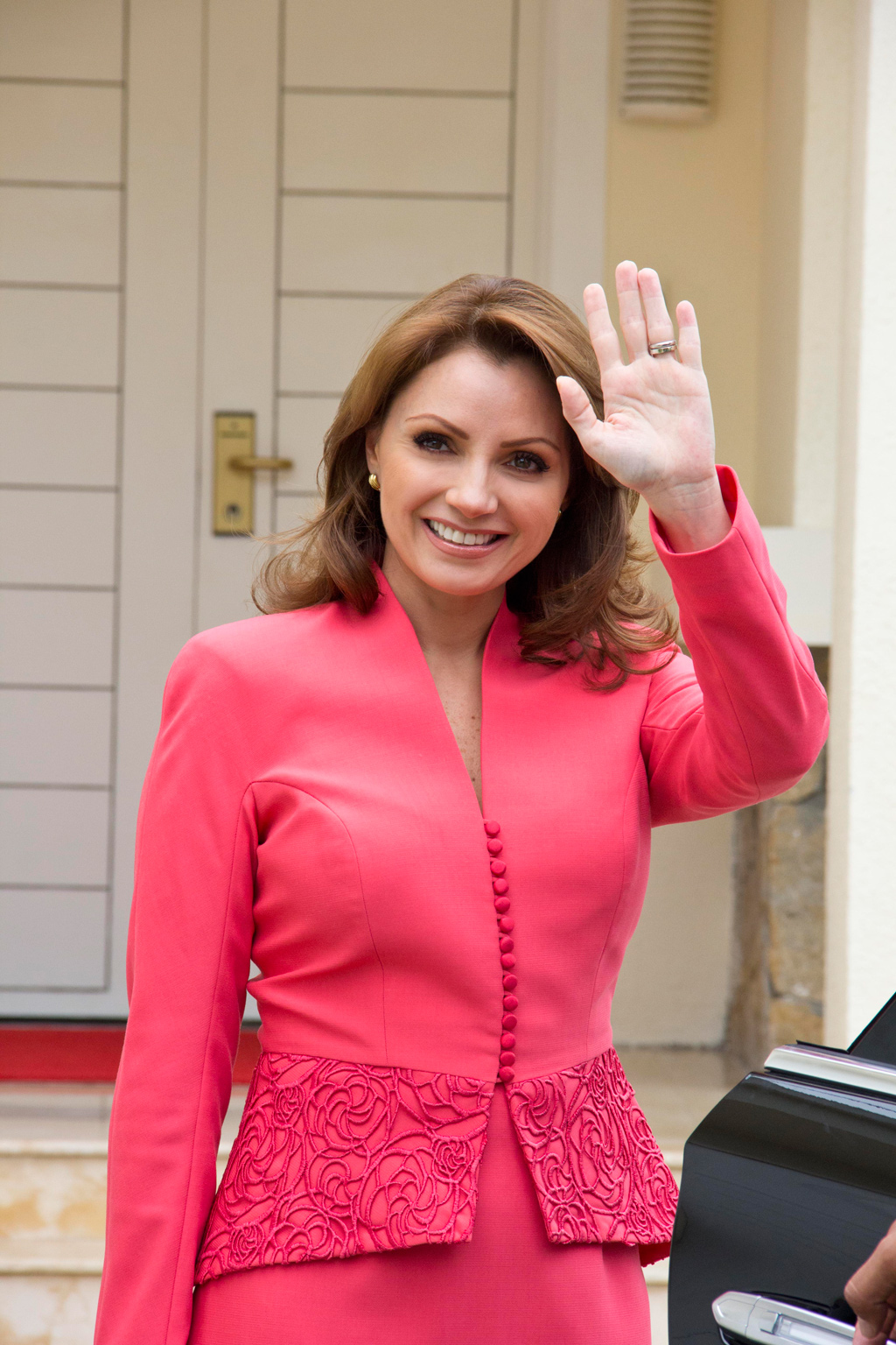 Camino a la reunión con con el Presidente de la República Popular China, el Excmo. Sr. Xi Jinping. Boao , República Popular China. 7 de abril de 2013.